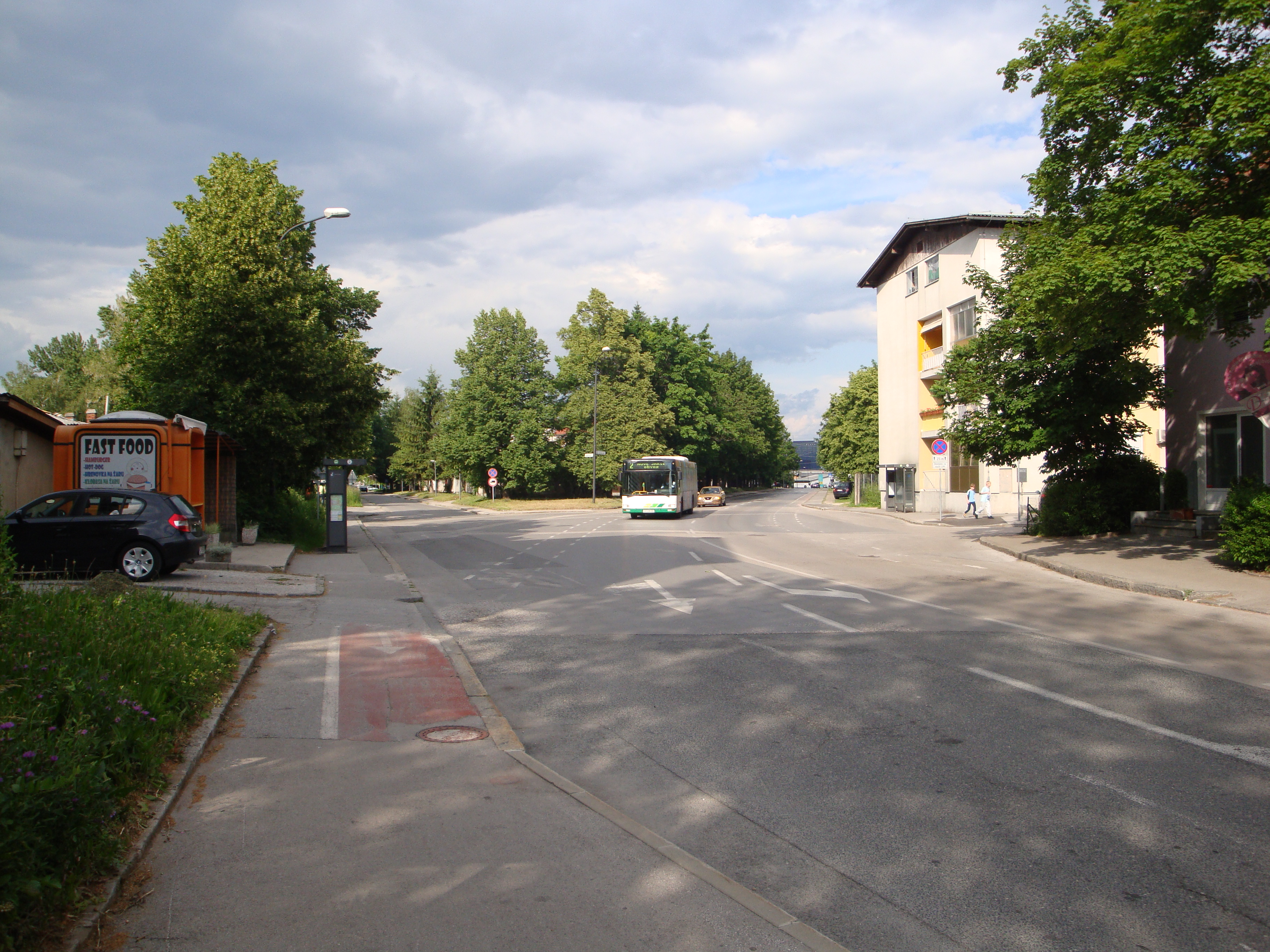 Kavčičeva ulica v Jaršah, Ljubljana